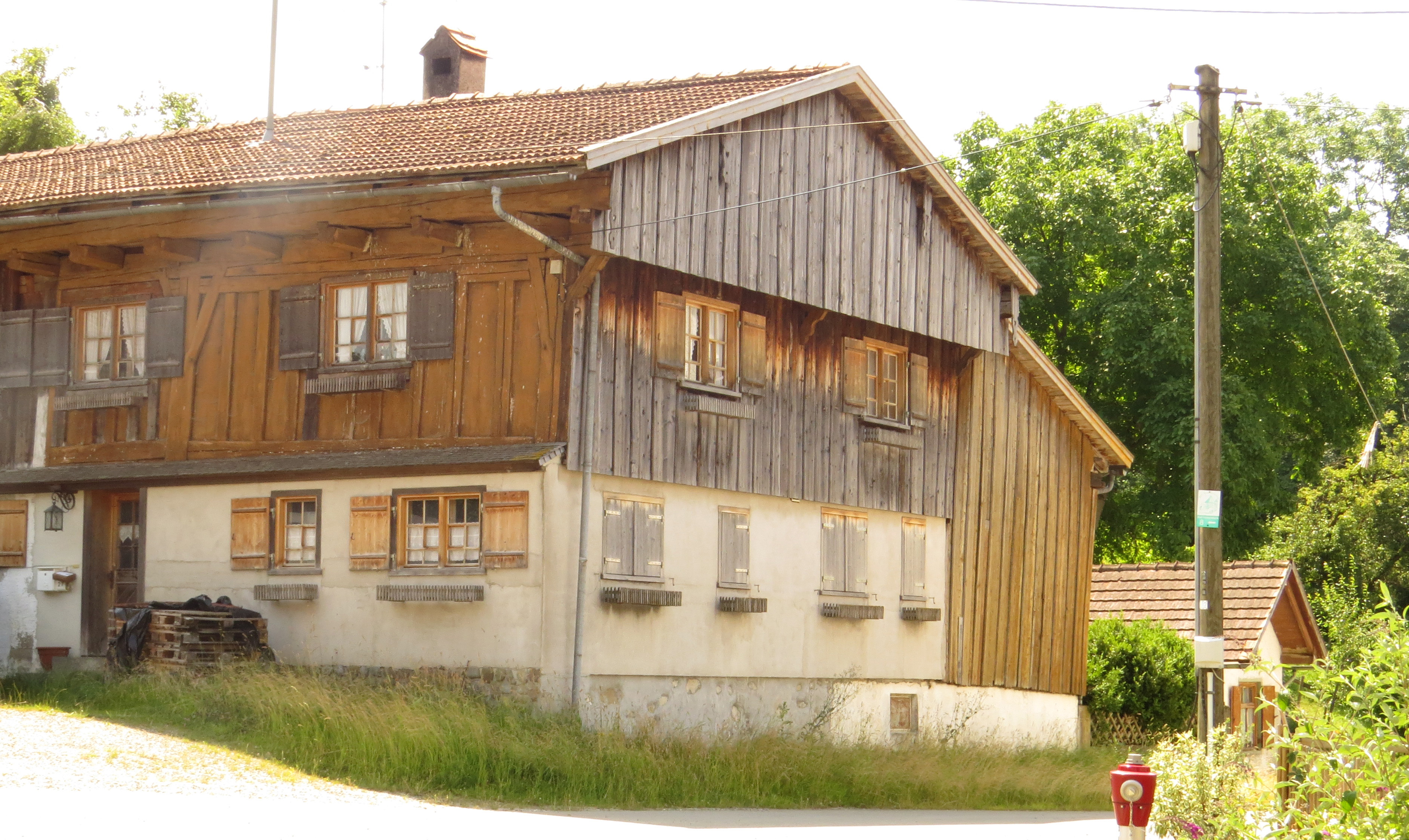 Oberthal 27, Bad Grönenbach